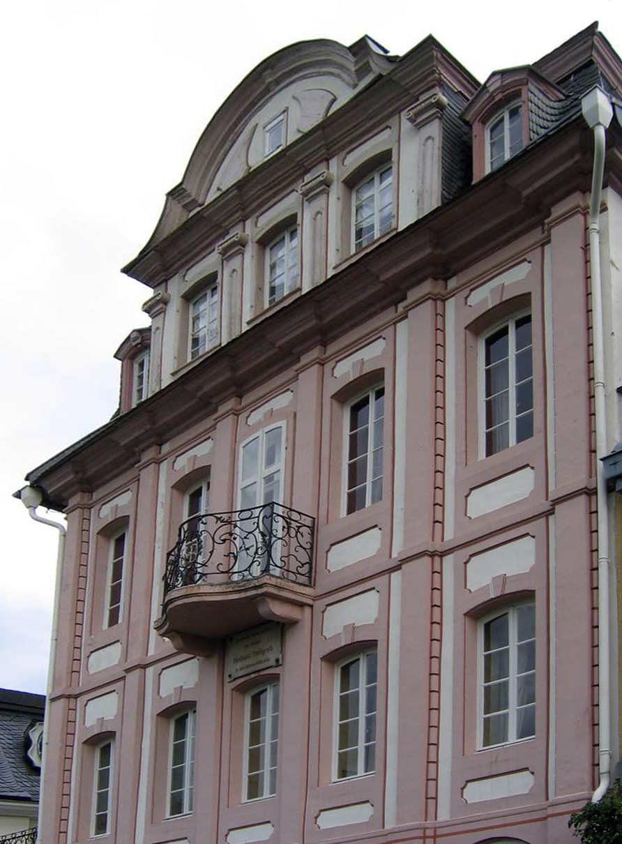 Freiligrathhaus in Unkel